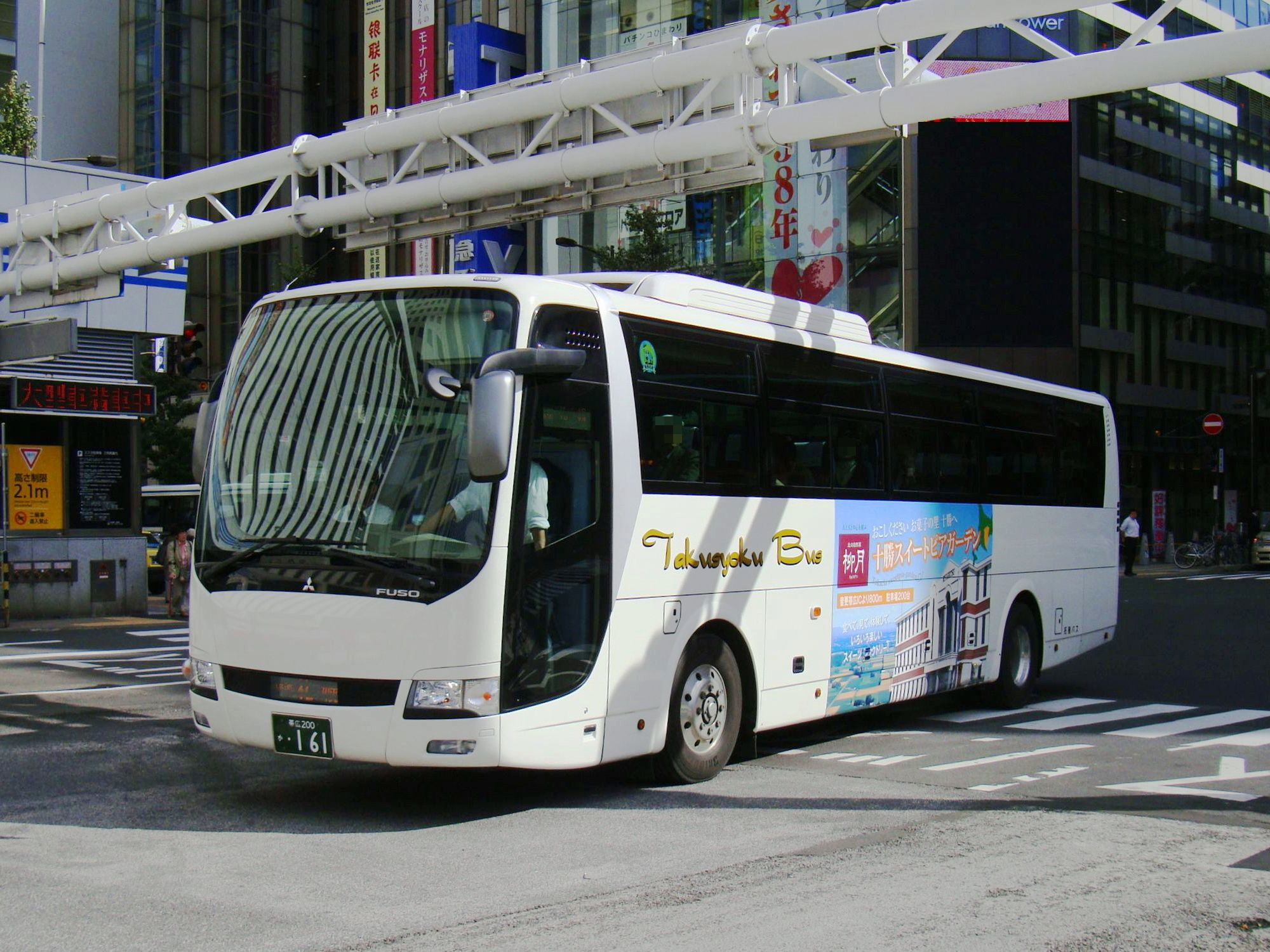 "Potato Liner" Obihiro to Sapporo